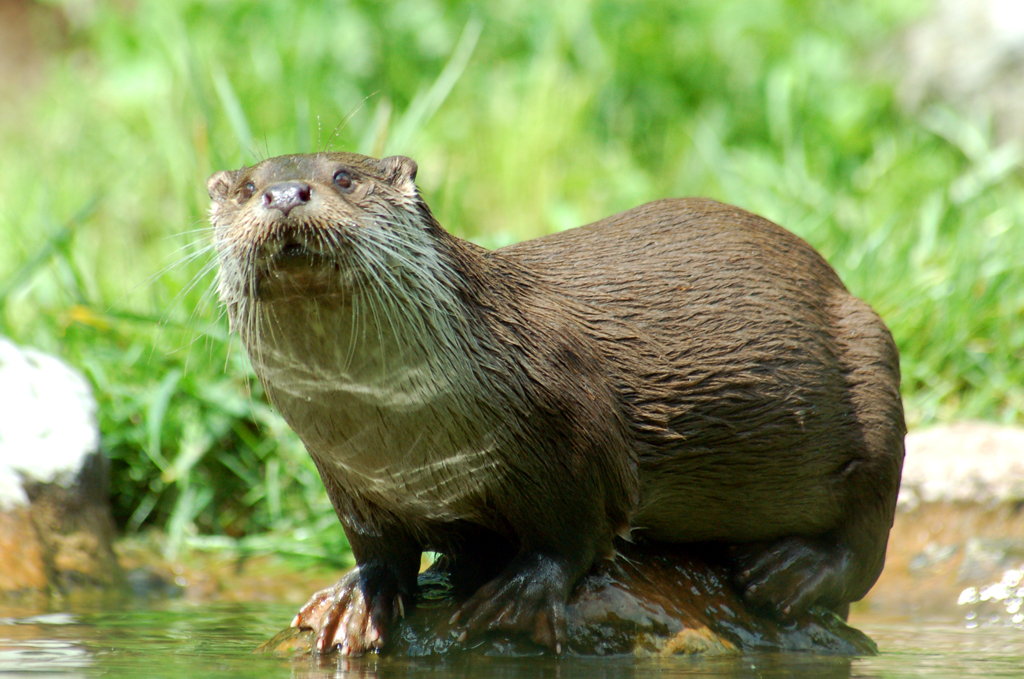 Une loutre